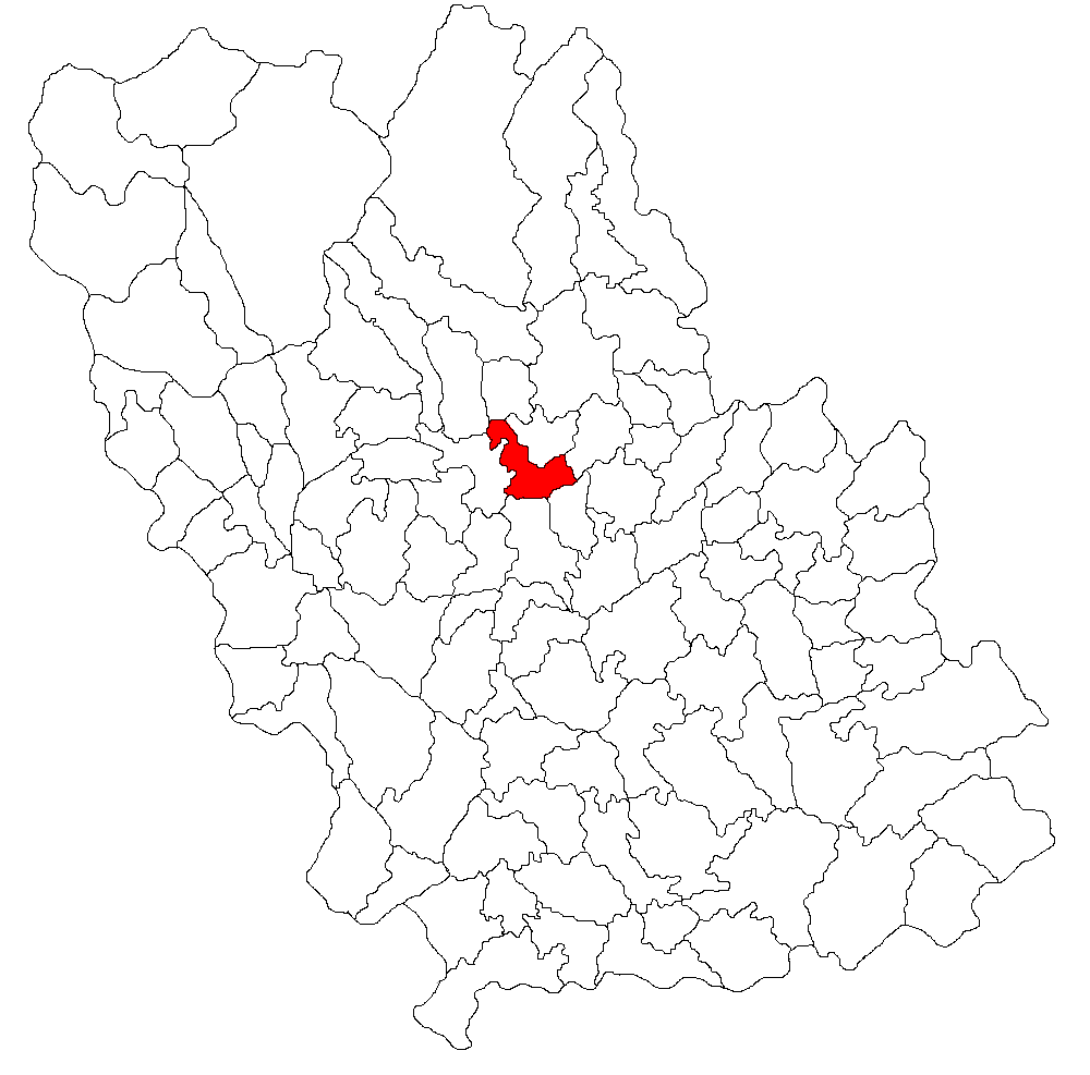 Categorie:Hărţi ale judeţului Prahova